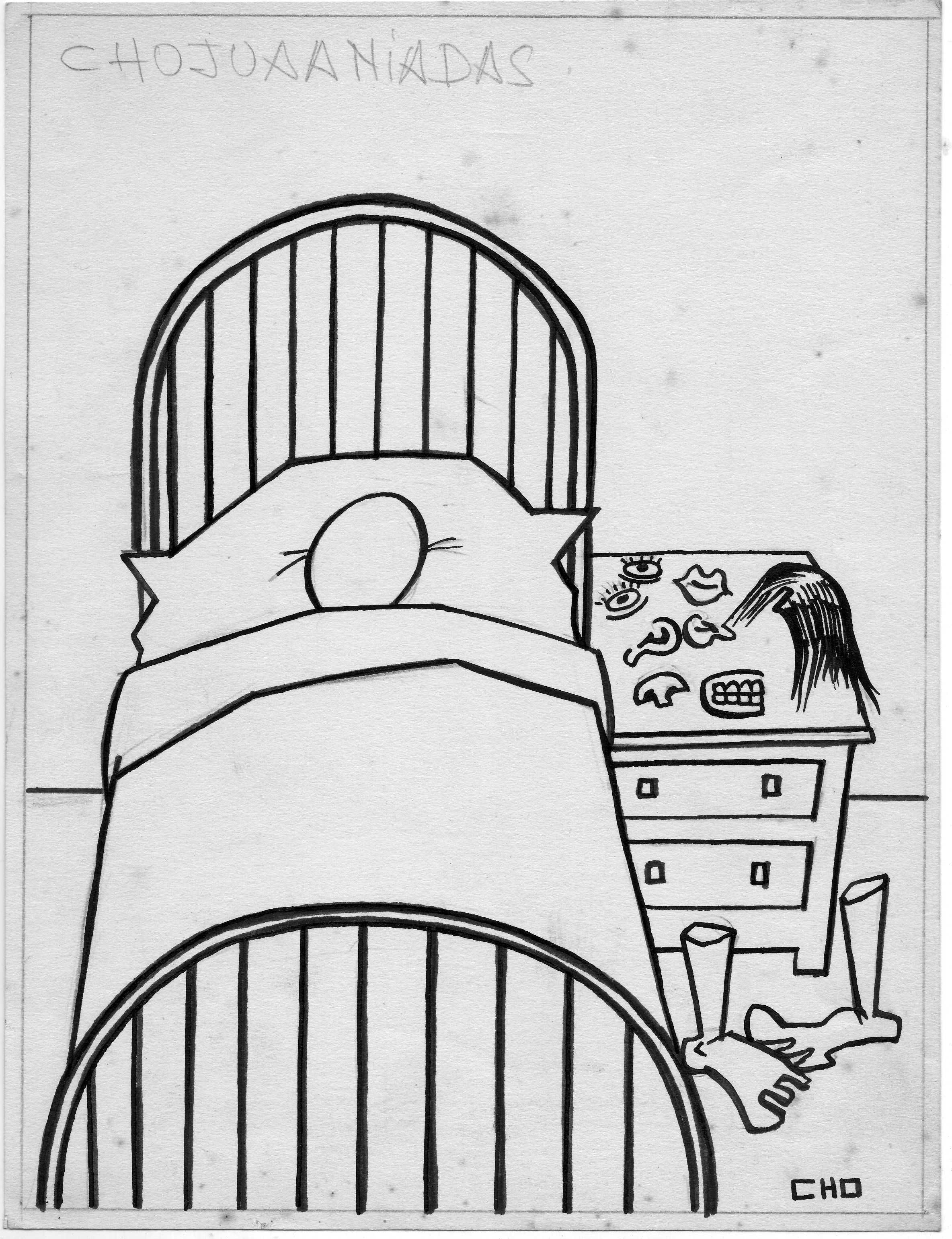 Chiste 3